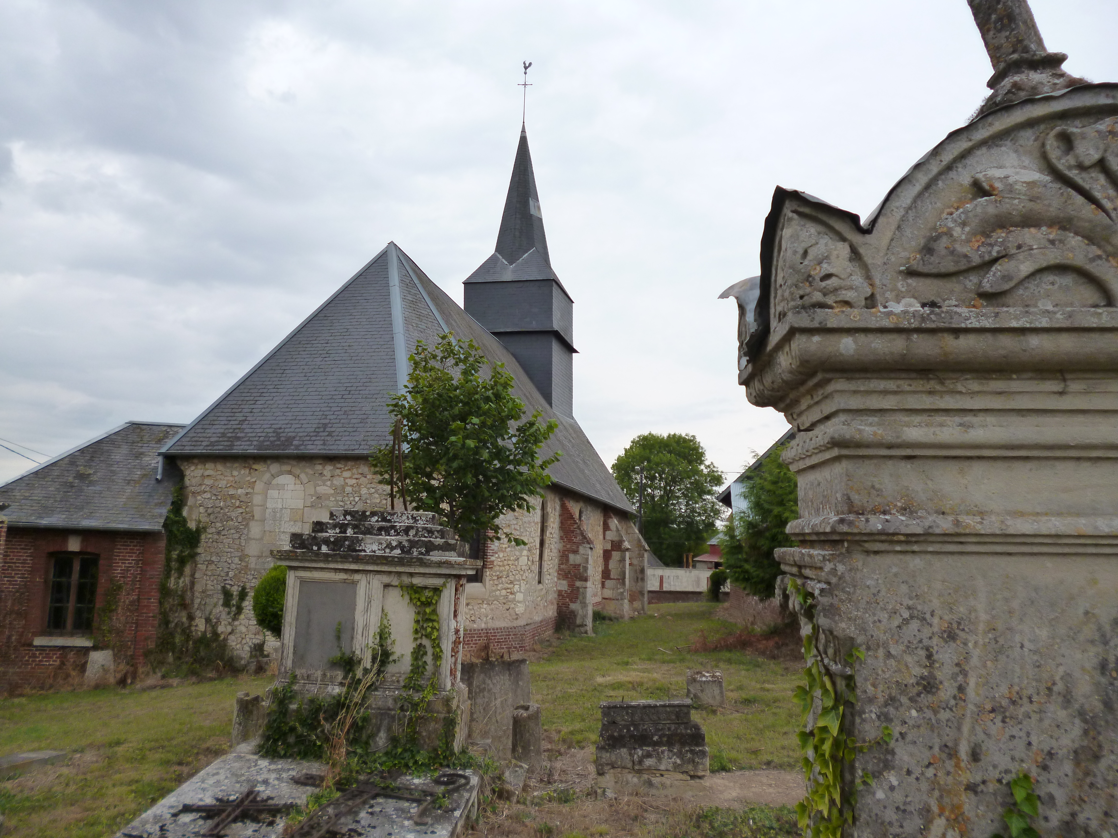 L'église Saint-Pierre de Bucamps (Oise).